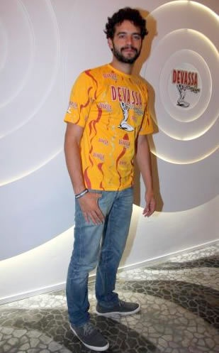 O ator Guilherme Winter chega para curtir a folia no camarote Devassa no Rio de Janeiro.